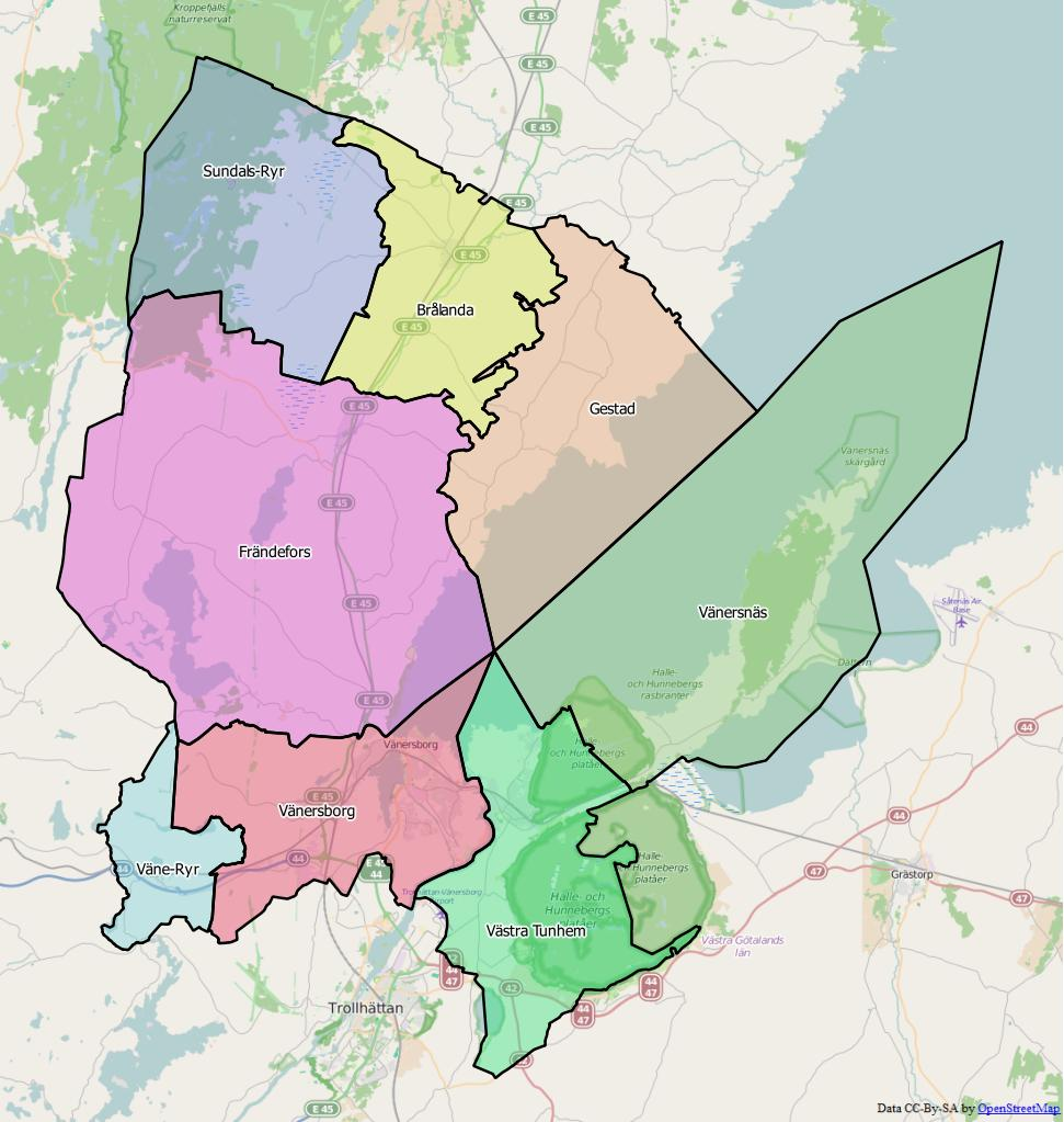 Distriktsindelningen i Vänersborgs kommun World file 86.67623172130504372 0 0 -86.67623172130504372 1339265.58187099825590849 8106550.97066966816782951